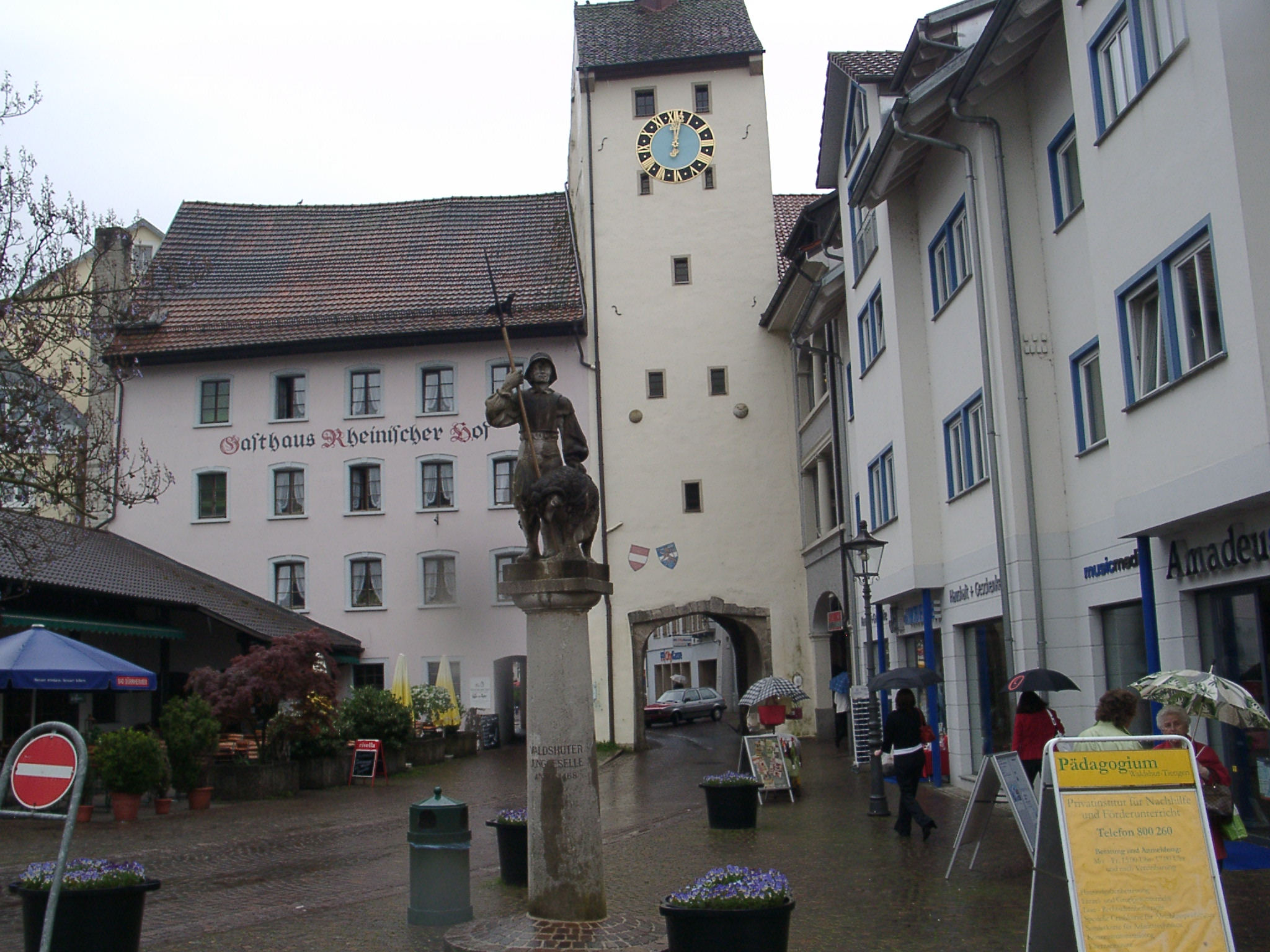 Waldshut, Stadttor; Skulptur "Steinerner Junggeselle" von Guta von Freydorf-Stephanow